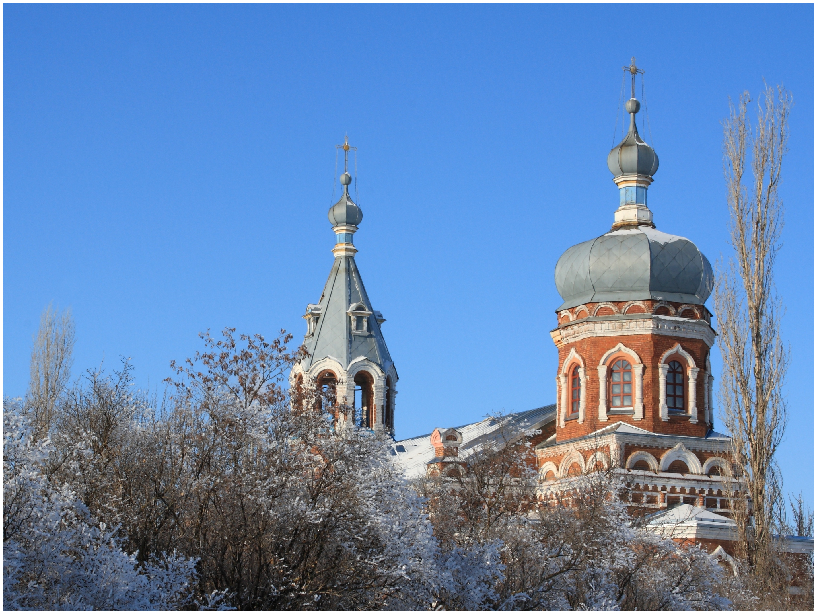 Рождественская церковь (Воронежская область, Поворино, село самодуровка)